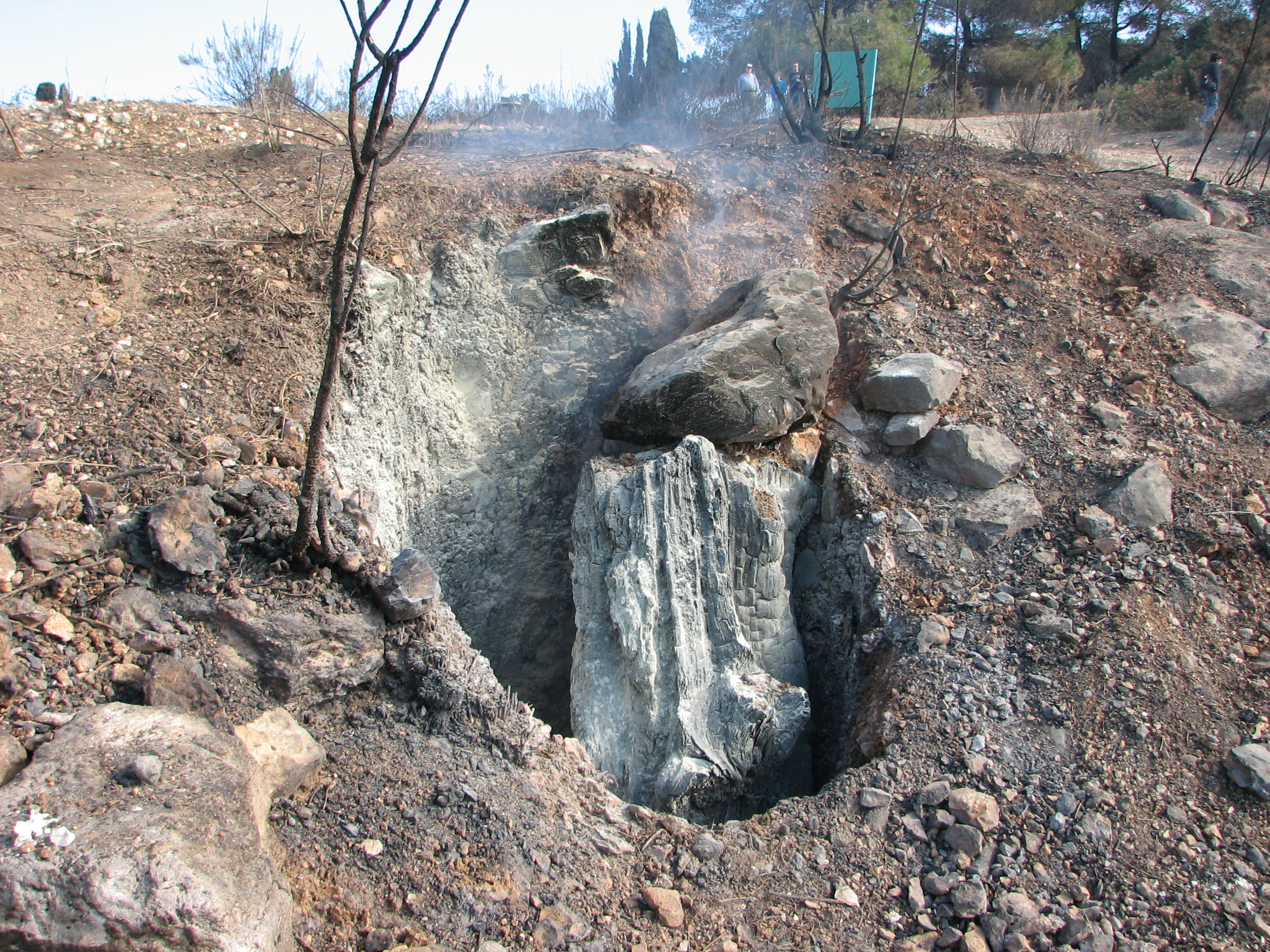 Mount Carmel Israel, after 2010 fire הכרמל לאחר השריפה בכרמל בחודש דצמבר 2010 טירת כרמל היא עיר במחוז חיפה בישראל ממוקמת במורדות המערביים של הר הכרמל בין שכונת דניה בחיפה לכפר גלים, בסמוך לכביש 4, הכביש הישן מחיפה לתל אביב. שרידי רמץ, גזע עץ שעדיין מעשן 4 ימים לאחר סיום השריפה, באזור הר אלון ליד כלא דמון